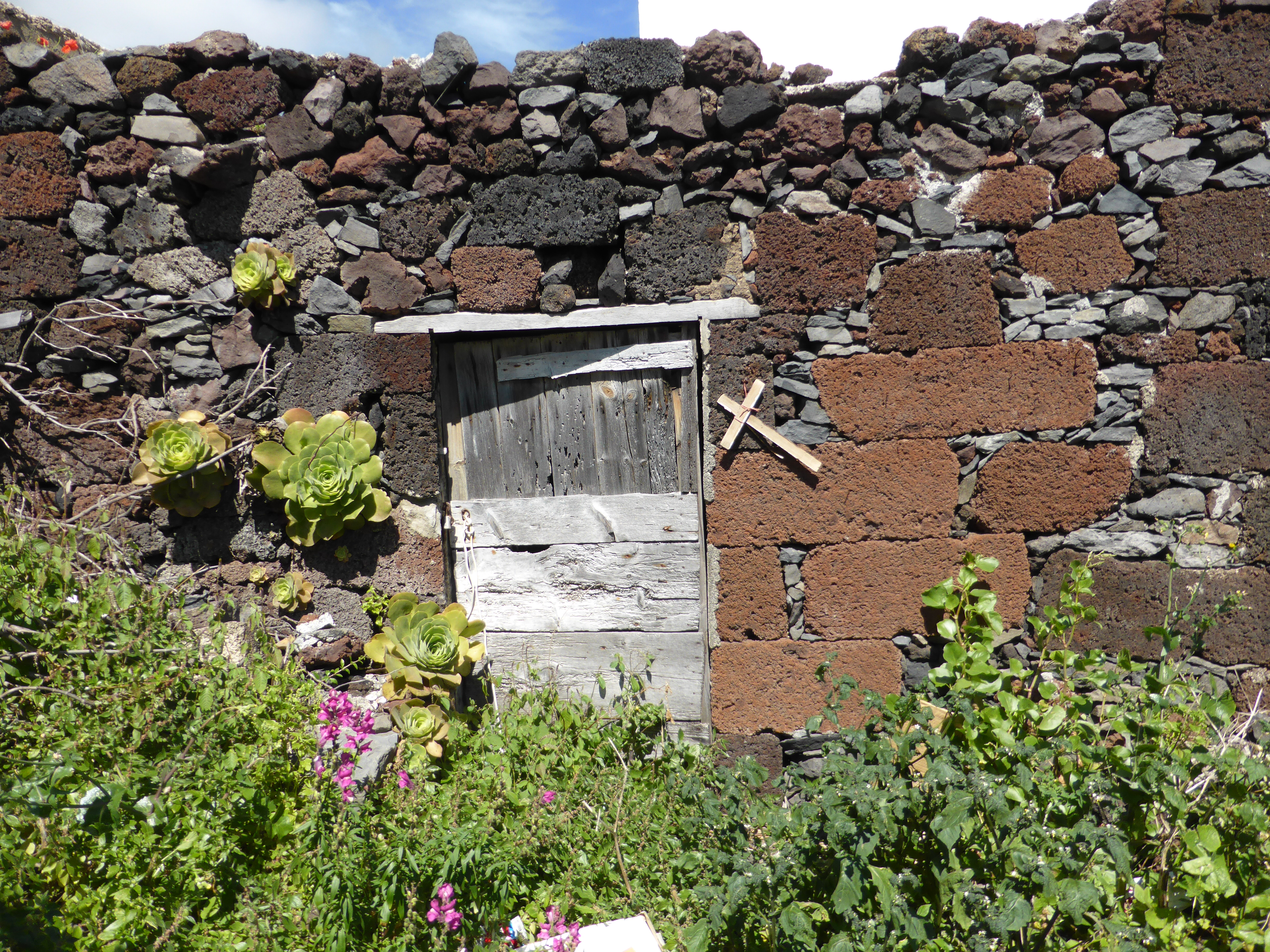 En el muro crecen varias "sanjoras" (Aeonium hierrense). Esta planta es un endemismo de El Hierro. también vemos una cruz de madera, junto a la puerta. En la tradición de la isla, se colocaban cruces en las casas donde fallecía una persona. El pueblo de Sabinosa se encuentra al oeste de la isla.